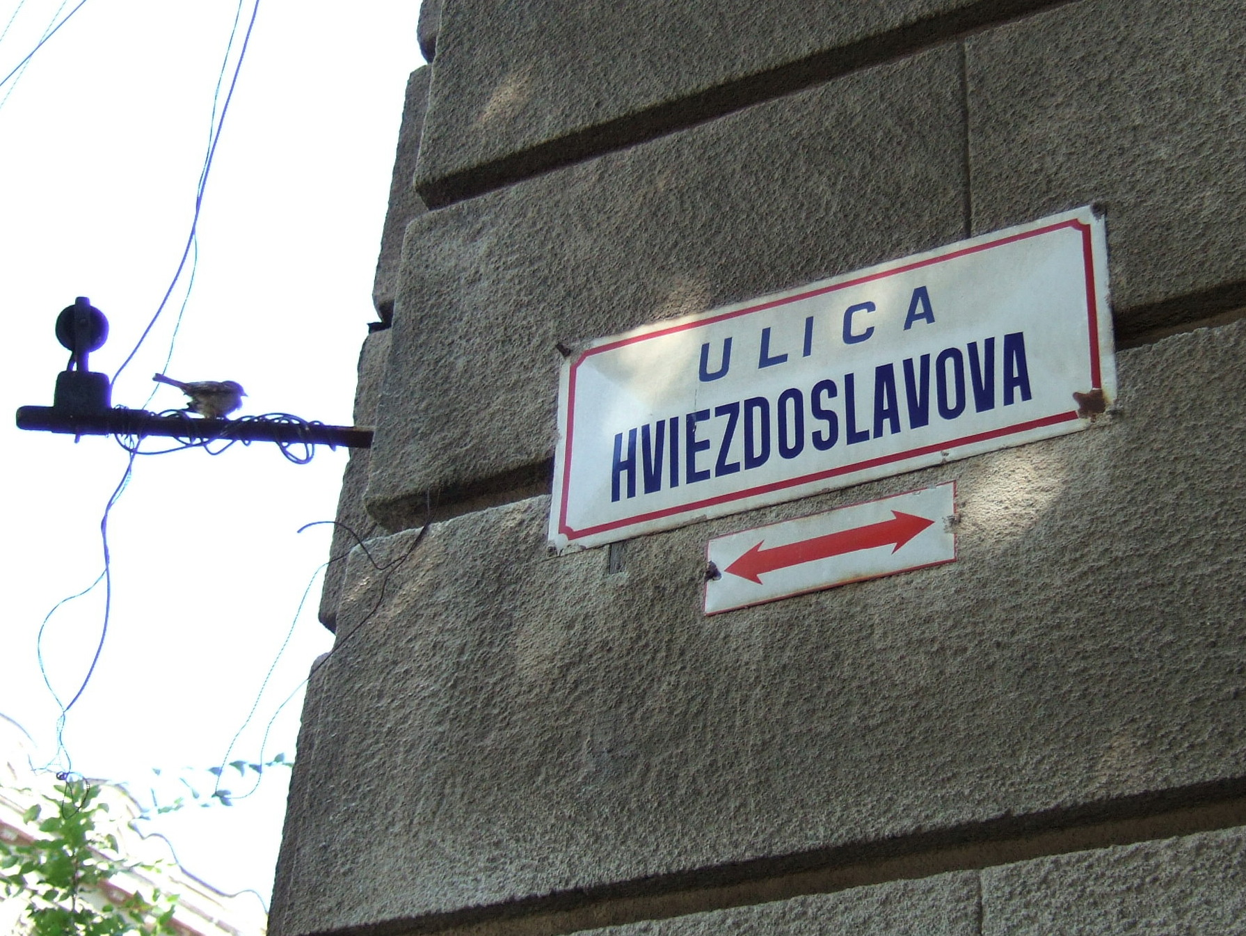 Hviezdoslavova ulica (Hviezdoslav Street)